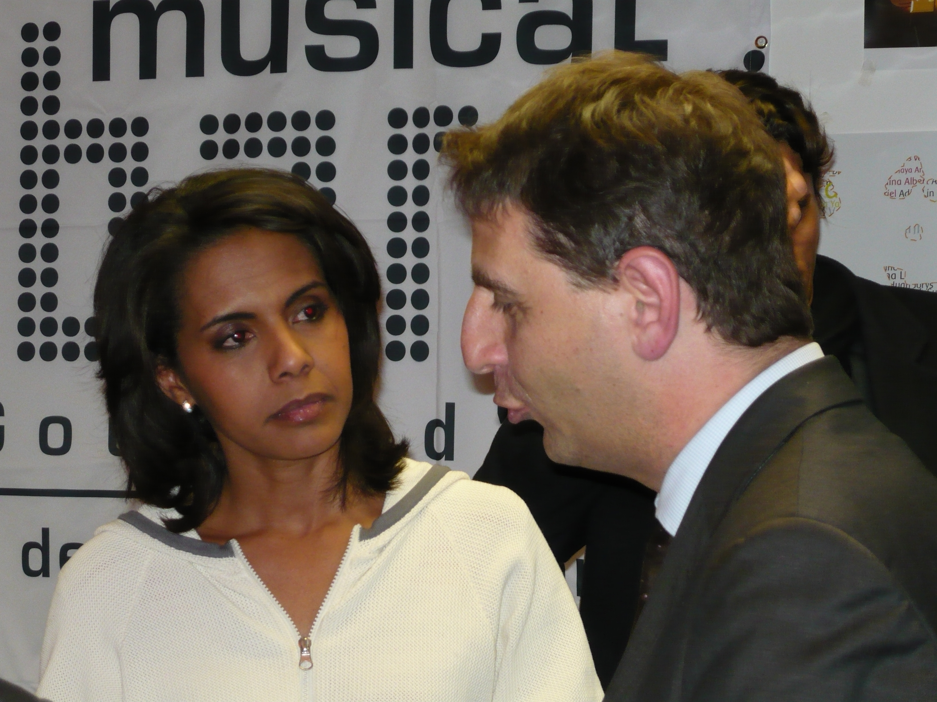 Le député Daniel Goldberg avec la journaliste Audrey Pulvar.